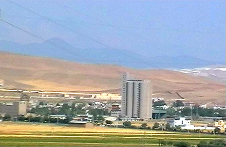 Azna ,Lorestan province ,Iran (Persia)